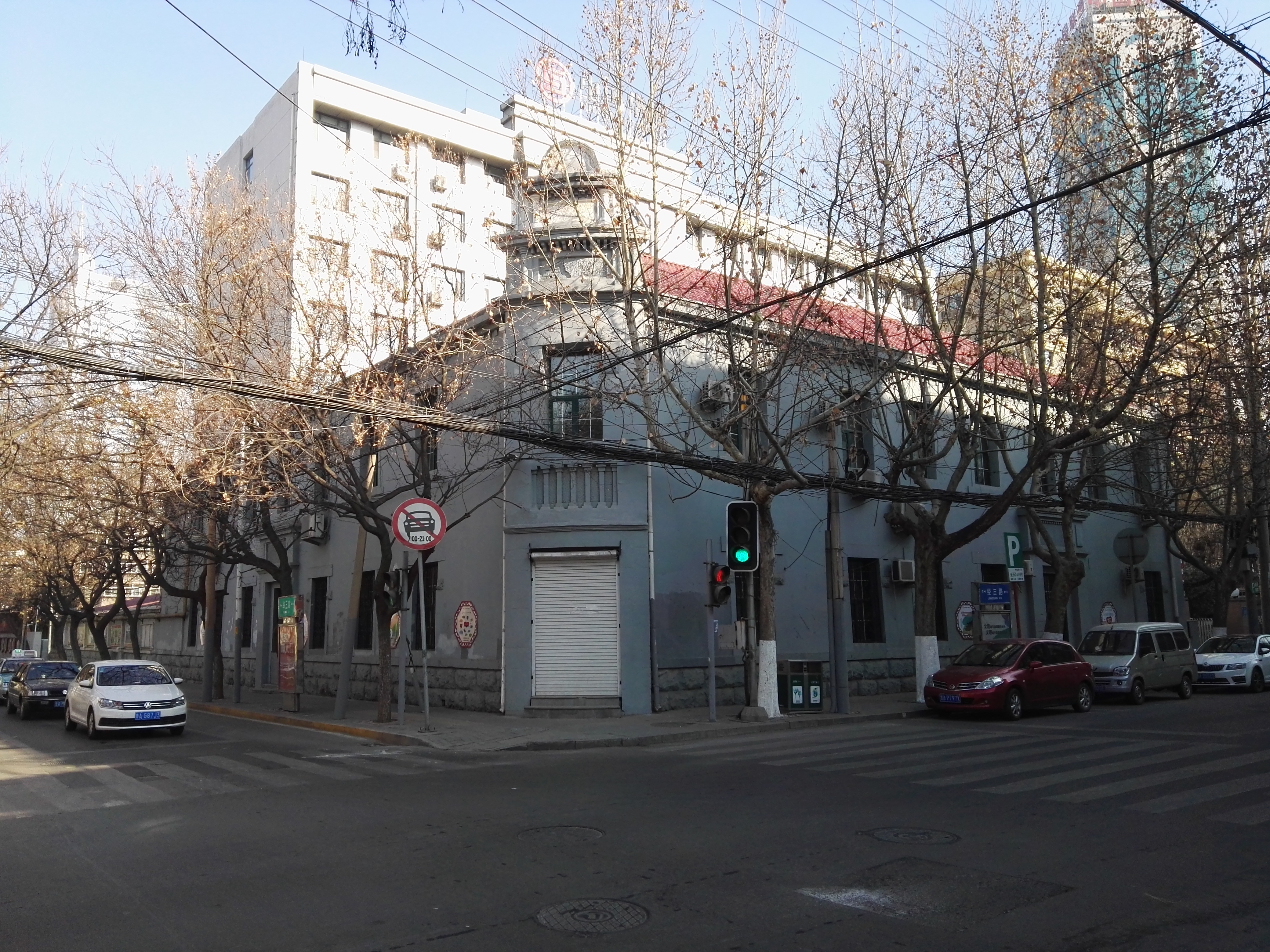 济南东莱银行旧址，经三路89号（经三路纬三路路口东北角）